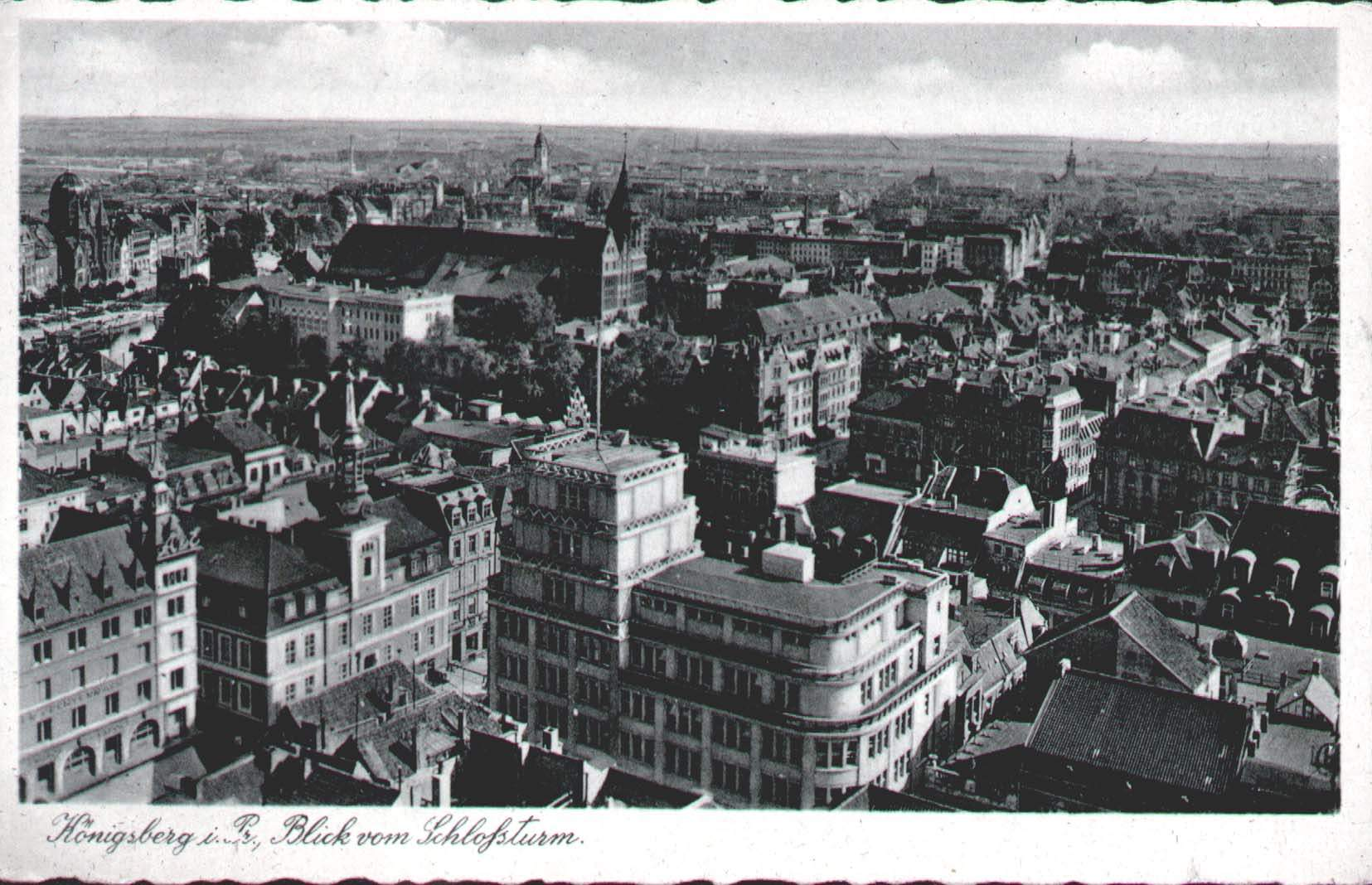 Достопримечательности города Кёнигсберг (Калининградская область РФ)